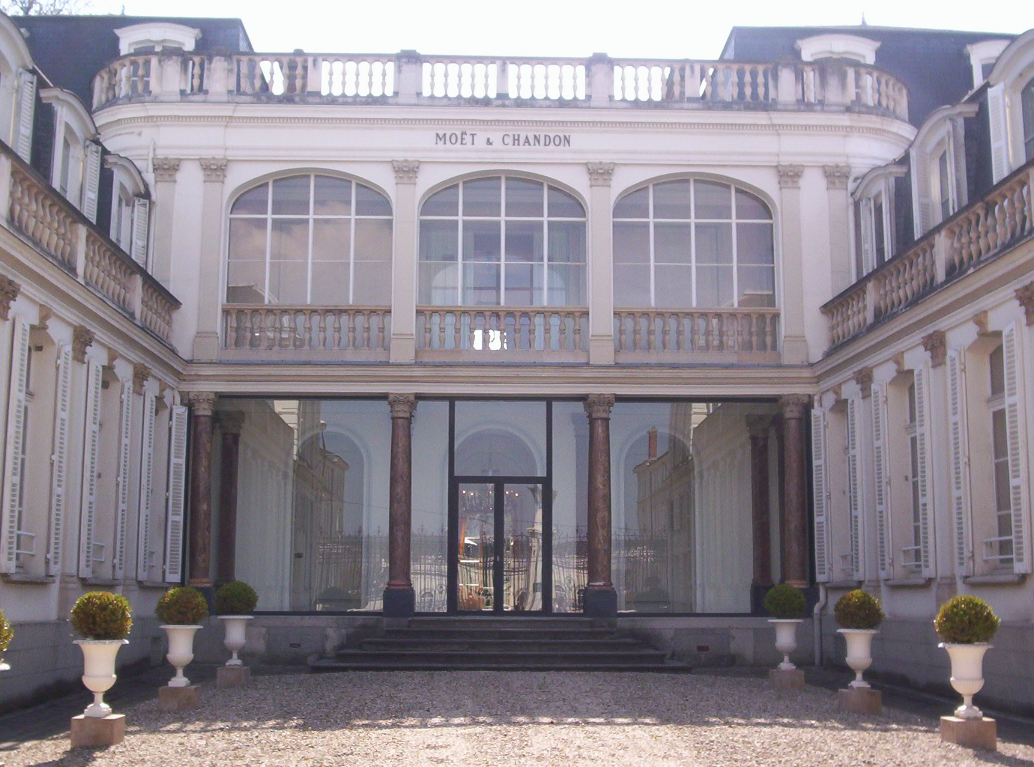 Épernay (Marne, Champagne-Ardenne, France) - Bâtiment du champagne Moët & Chandon sur l'avenue de Champagne.